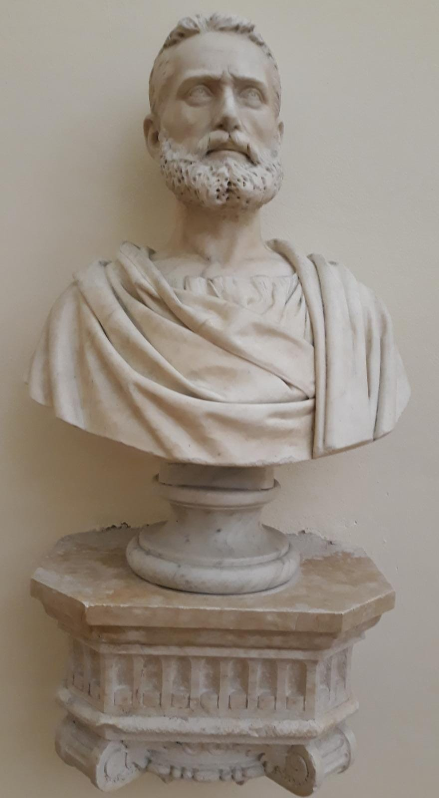 Busto di Vitruvio